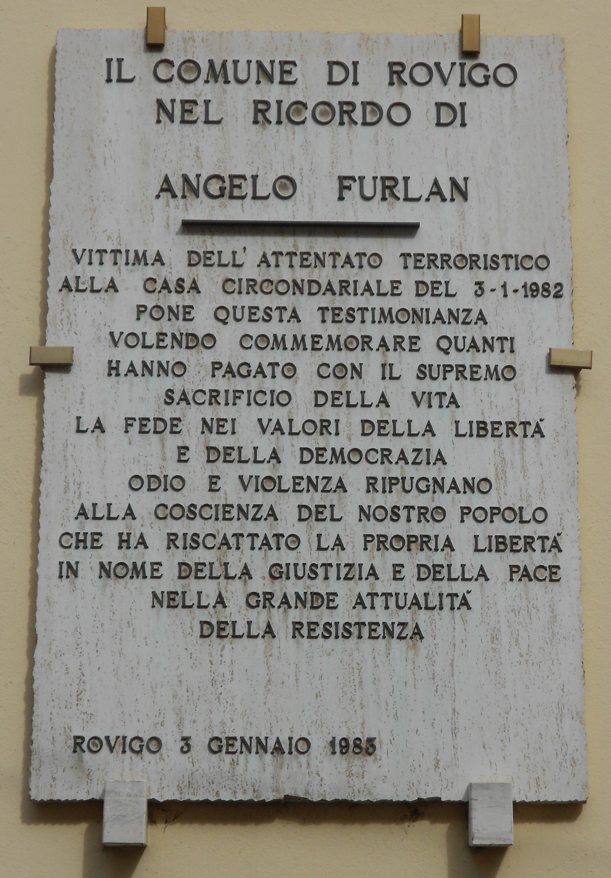 Angelo Furlan, vittima dell'evasione terroristica dal carcere di Rovigo 3 gennaio 1982